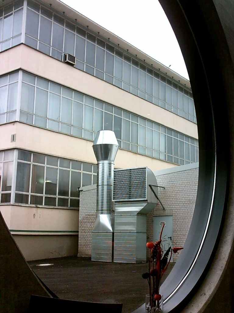 Blick aus der Cafeteria des Steiffmuseums auf eine der Produktionshallen, selbst fotografiert, Sommer 2005 --Xocolatl 12:15, 10 April 2006 (UTC)